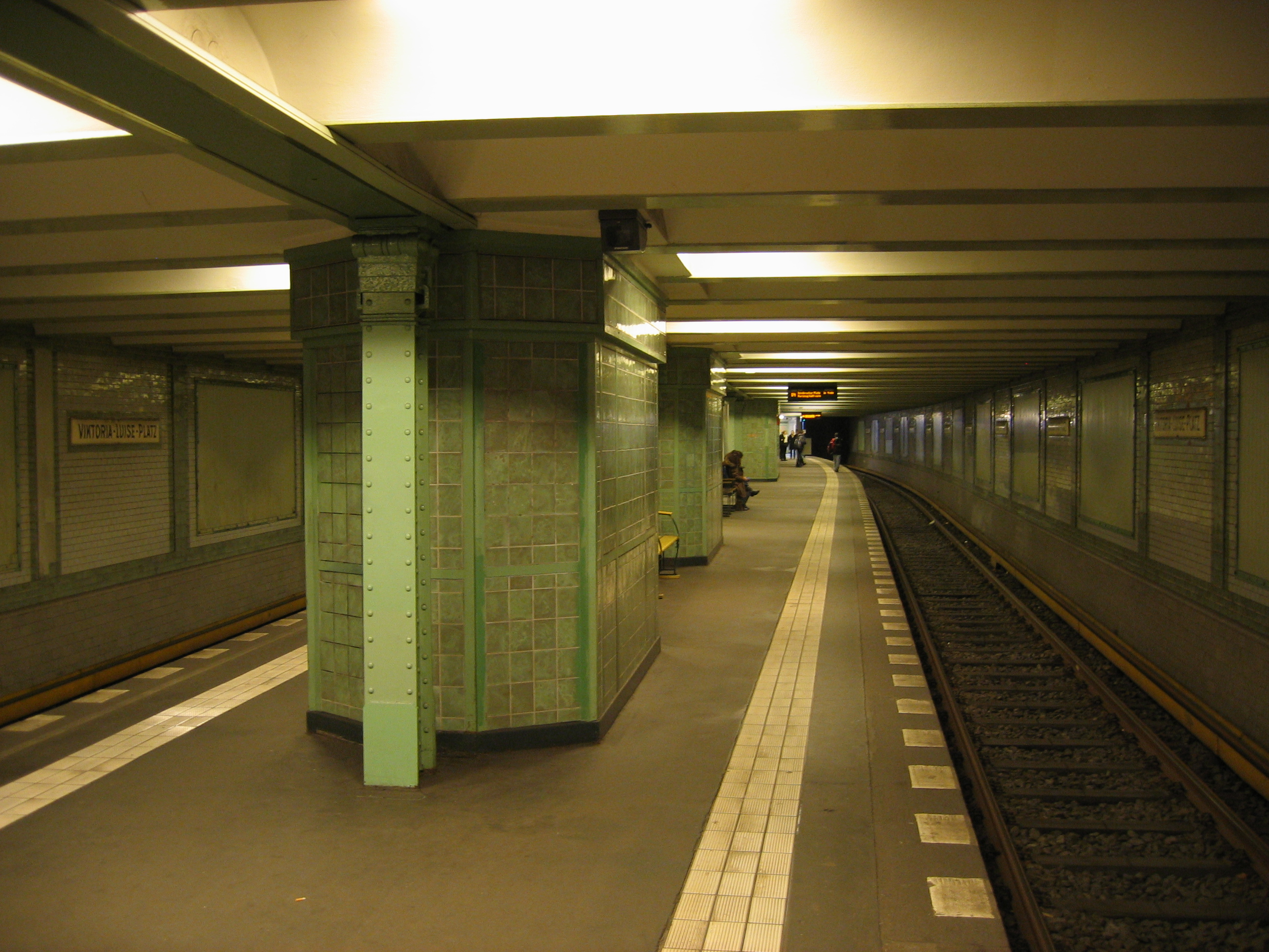 U-Bahnhof Viktoria-Luise-Platz in Berlin